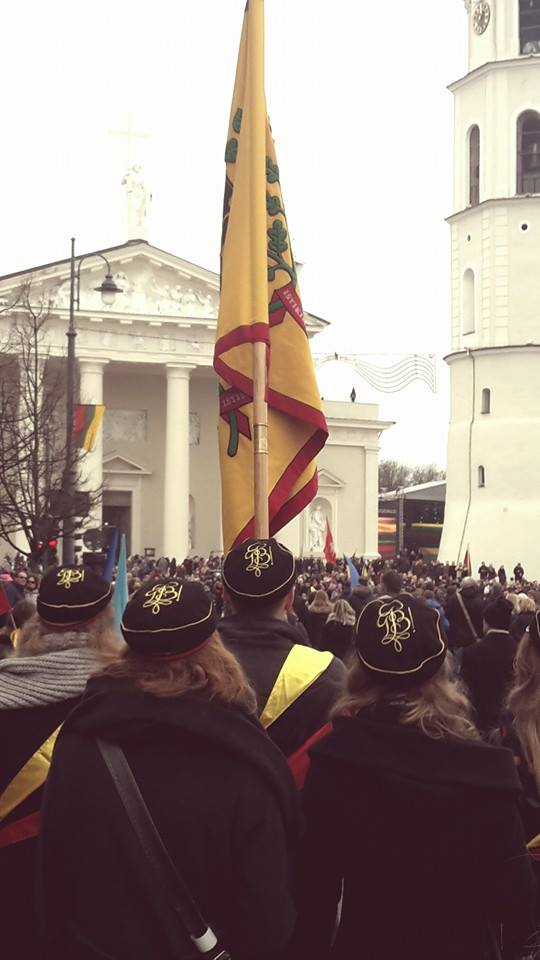 Korporacija